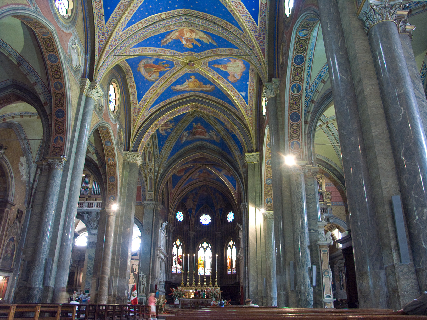 Intérieur de l'église Sainte-Marie sur la Minerve (Santa Maria sopra Minerva)